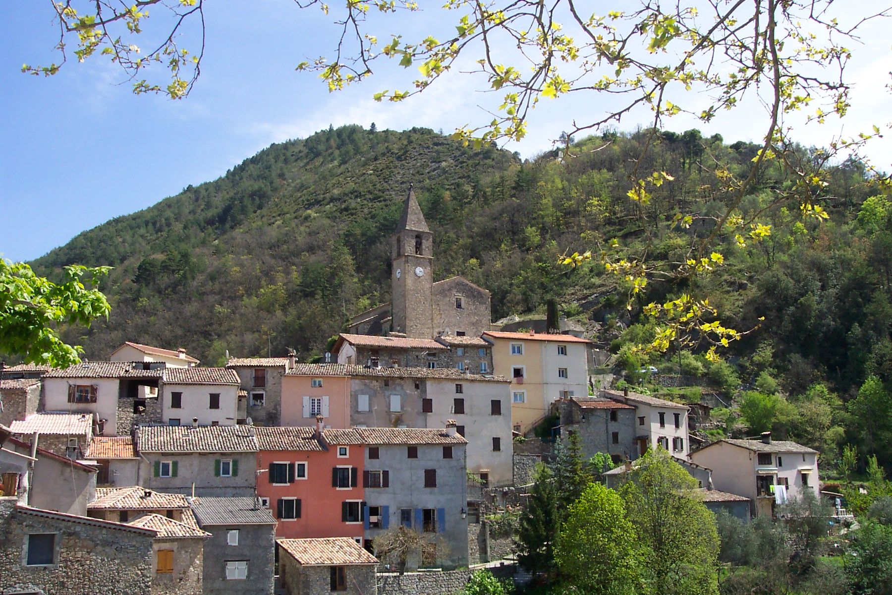 Vue generale